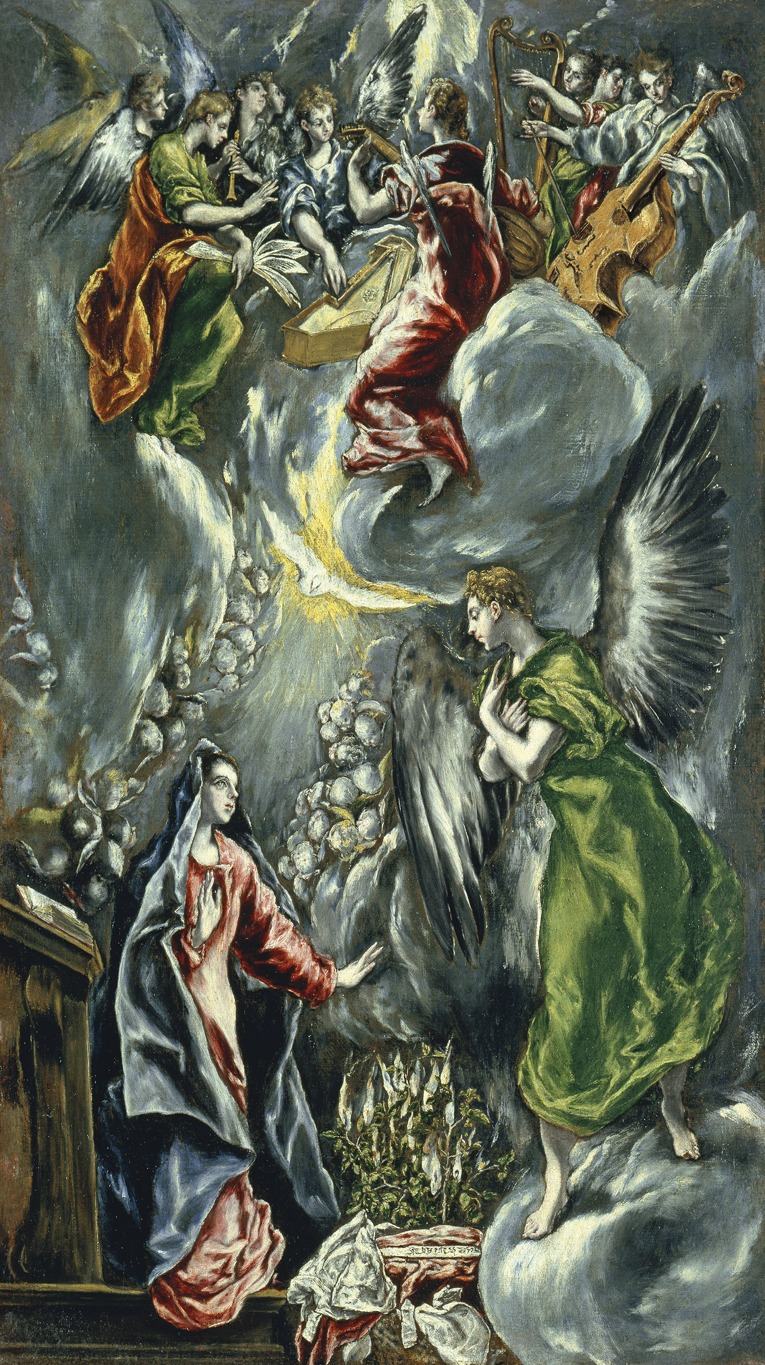 La obra representa el momento en que el Arcángel San Gabriel anunció a la Virgen María que sería la madre de Jesucristo, el Mesías.